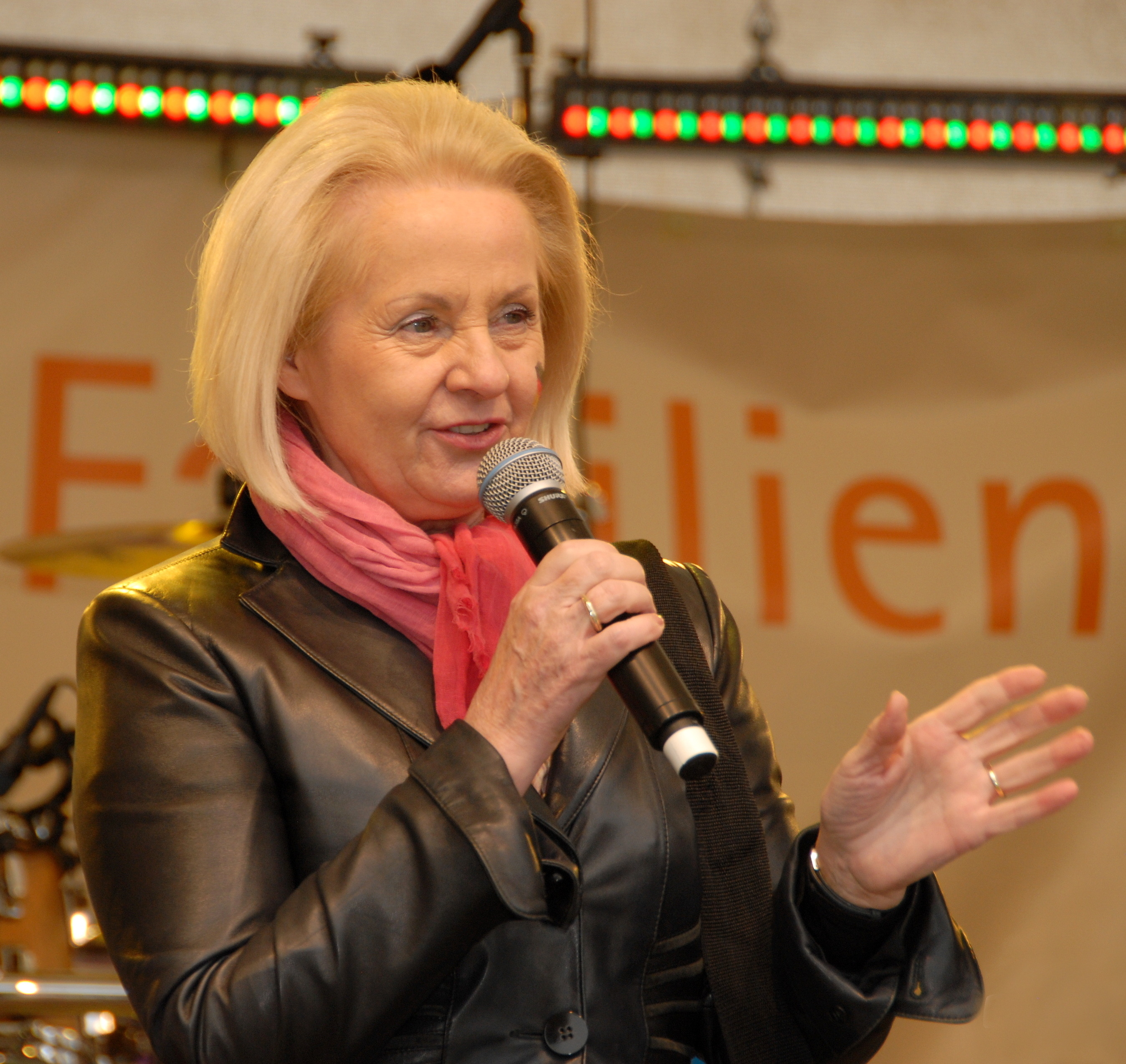 Christine Ursula Clauß zum sächsischen Familientag 2014 in Zittau.